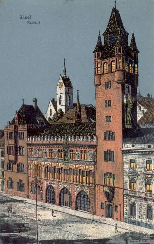 Basel, Rathaus